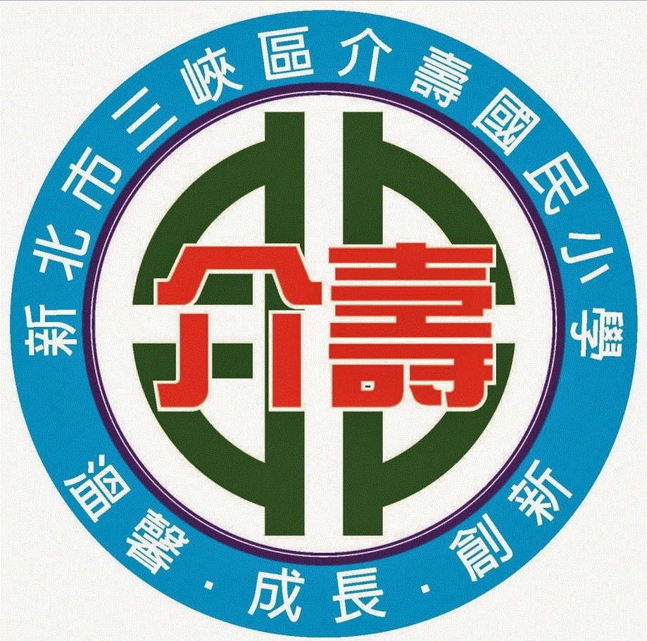 三峽區介壽國小